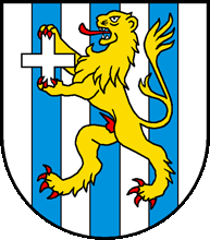 Wappen von Hauterive Kanton Freiburg Schweiz